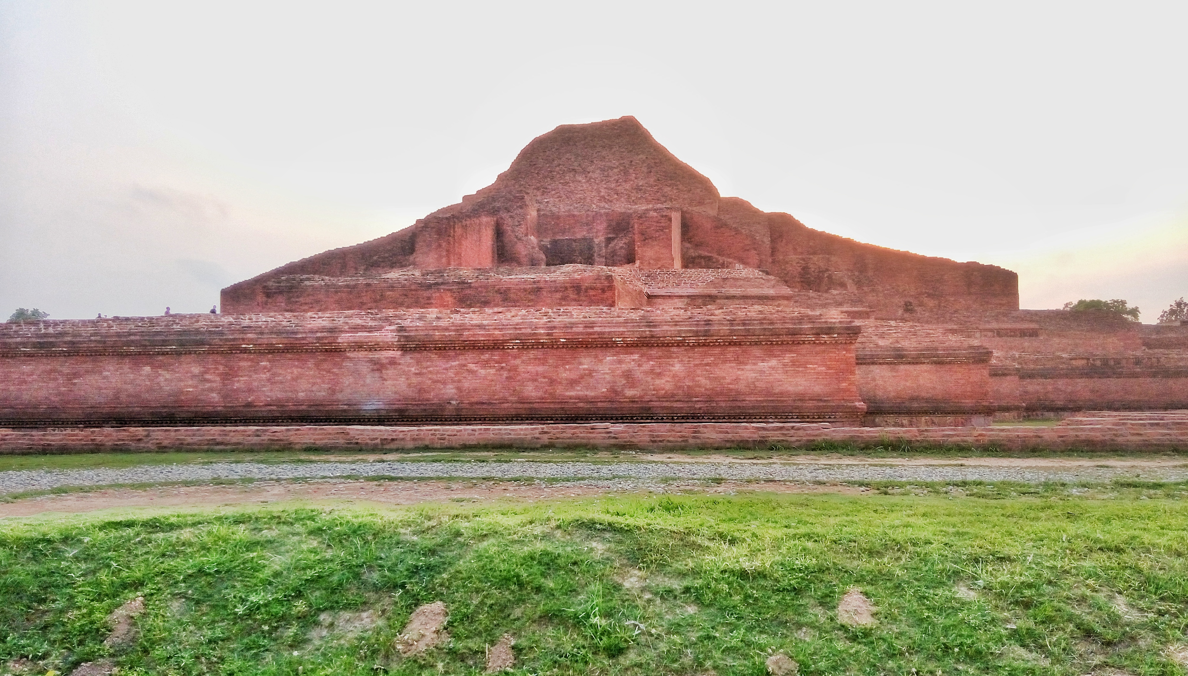 পাহাড়পুর বৌদ্ধ বিহার